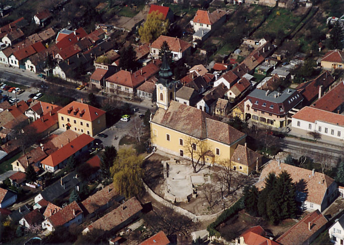 Budakeszi - Hungary - Europe